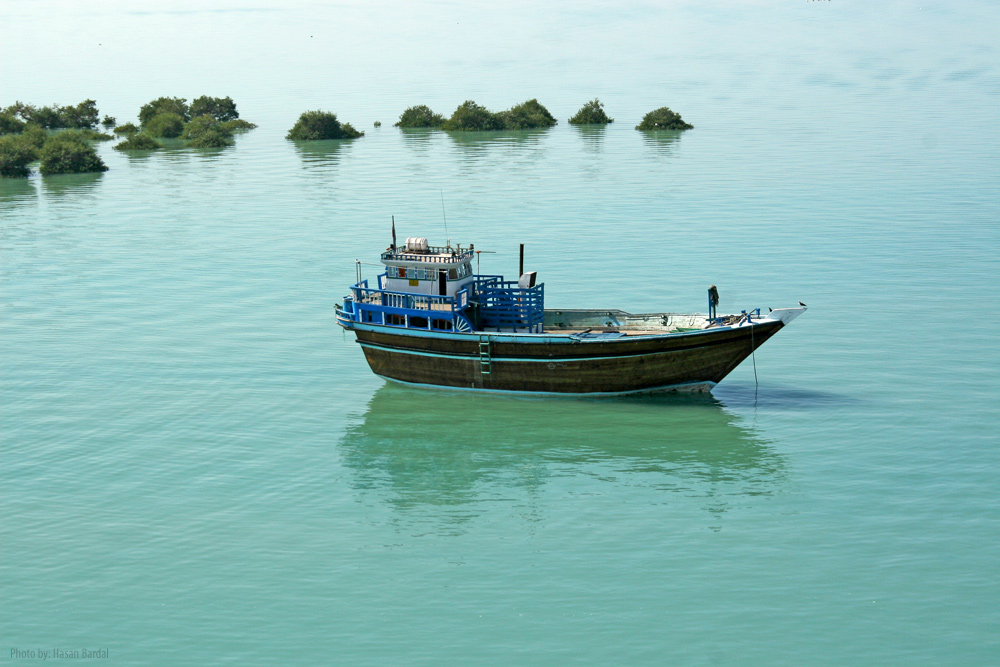 نمایی از بادگیرهای منحصر به فرد روستای لافت